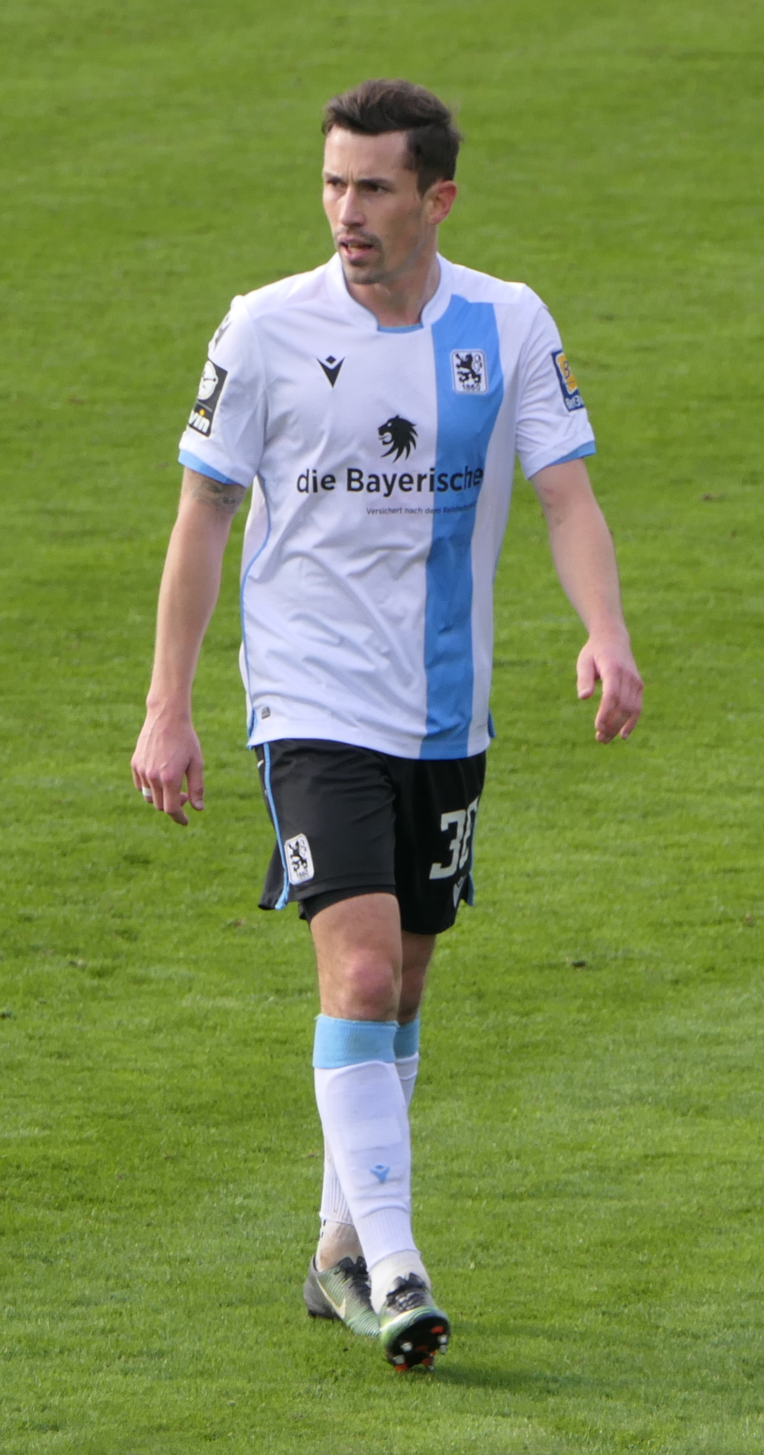 Der Fussballprofi Phillipp Steinhart im Trikot vom TSV 1860 München beim Heimspiel gegen Eintracht Braunschweig am 26.01.2020.